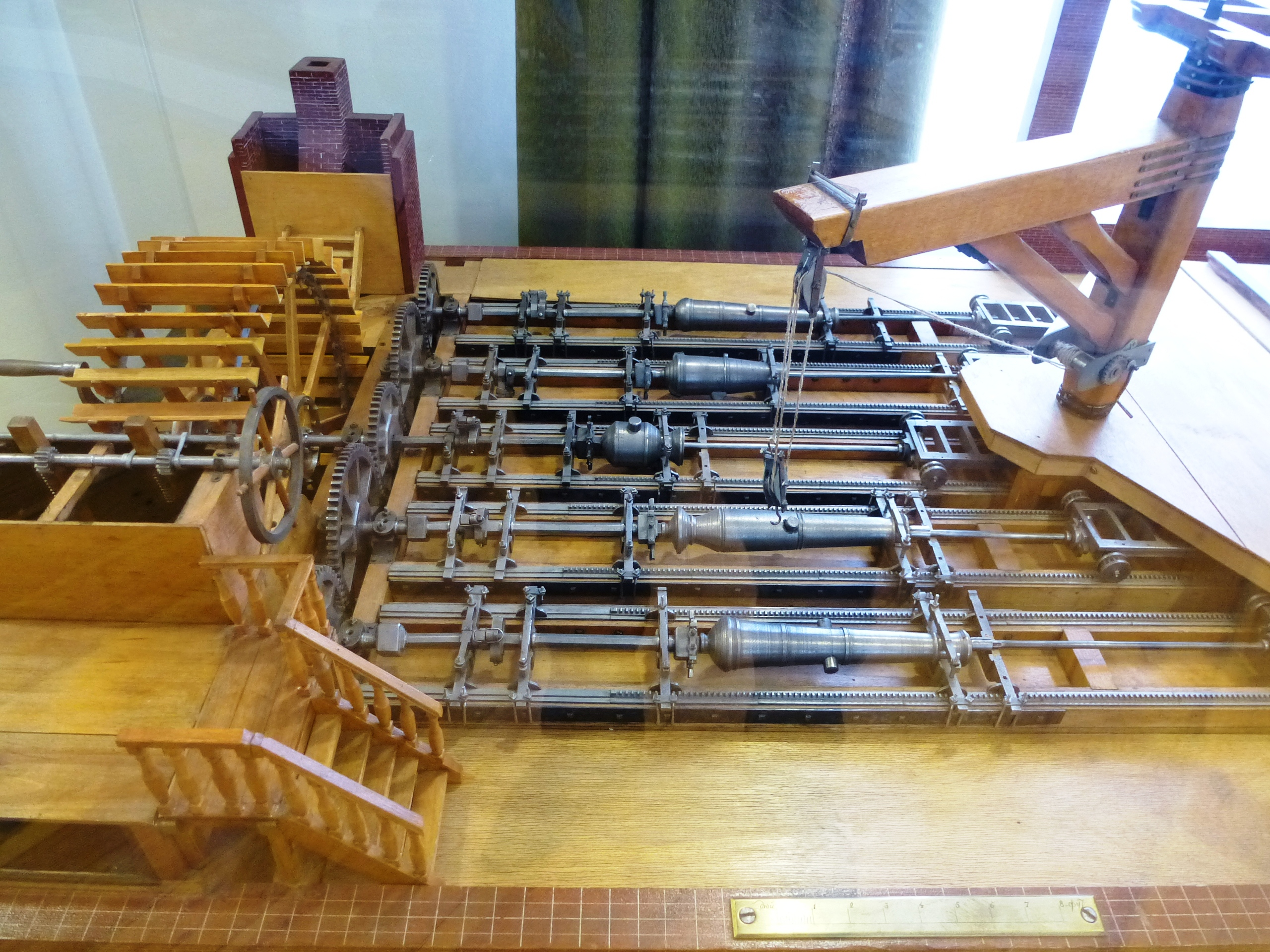 Макет цеха сверловки пушек на Александровском заводе в Петрозаводске.XVIII век.(источник - Национальный музей Республики Карелия)